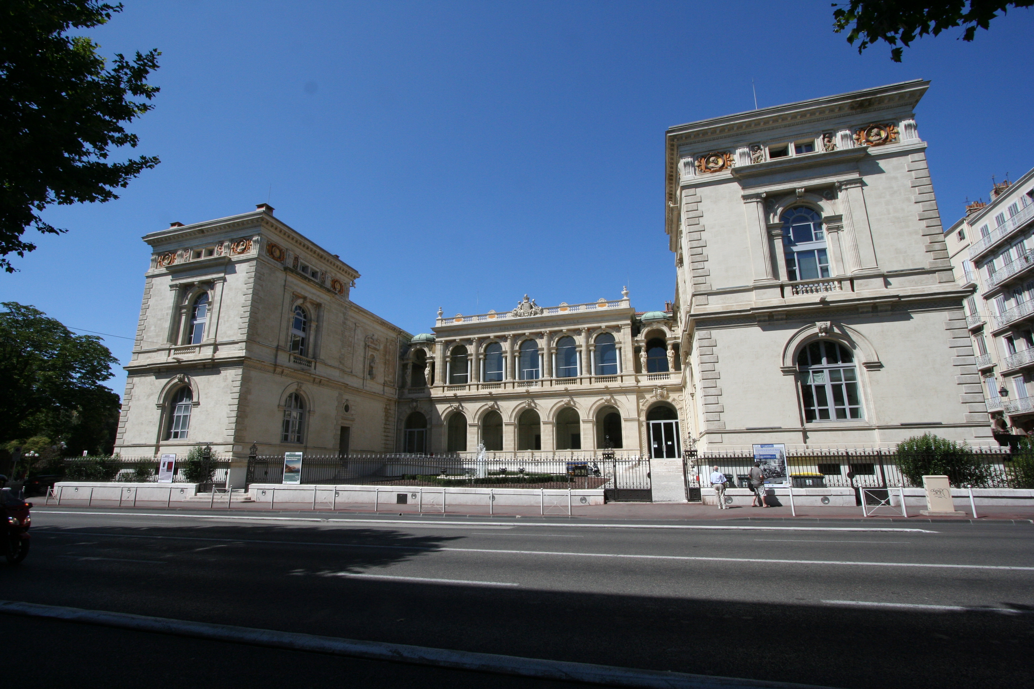 Vue générale du musée d'art de Toulon (Var) situé au N°113 du boulevard du maréchal Leclerc.